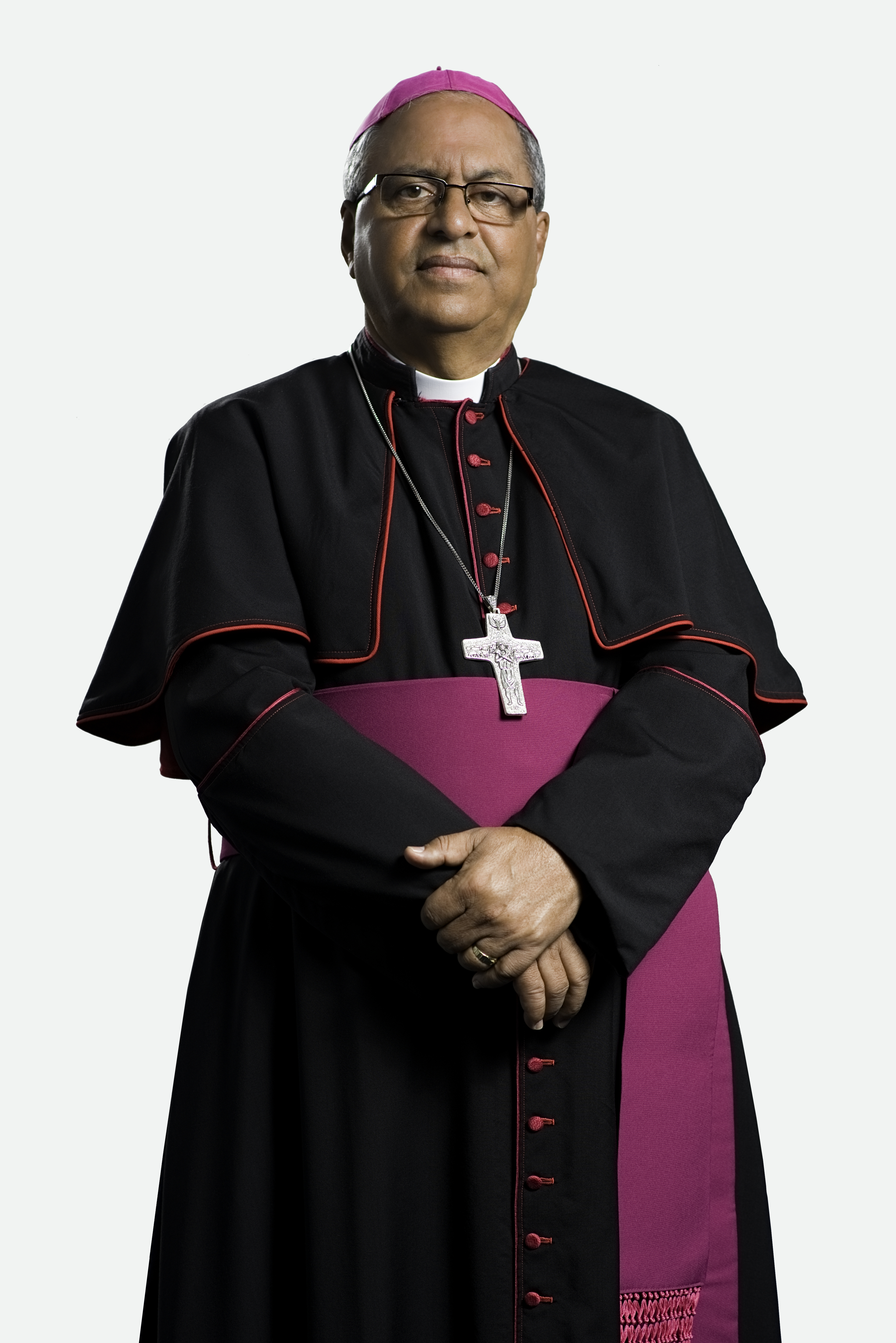 Obispo Auxiliar de Santo Domingo